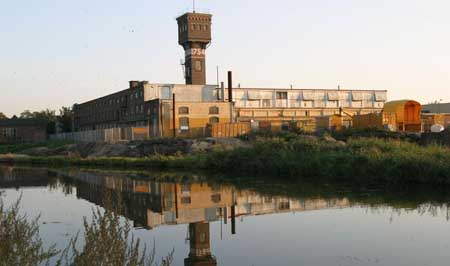 De DRU het bekendste van Ulft.